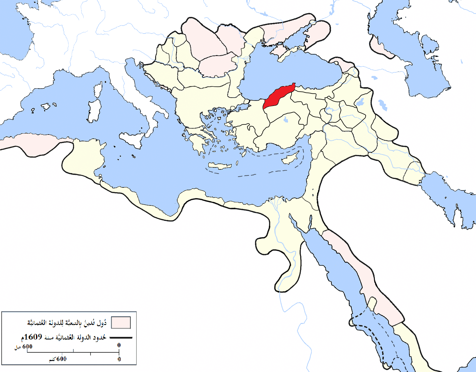 إيالة قسطموني في الدولة العُثمانيَّة سنة 1861م.